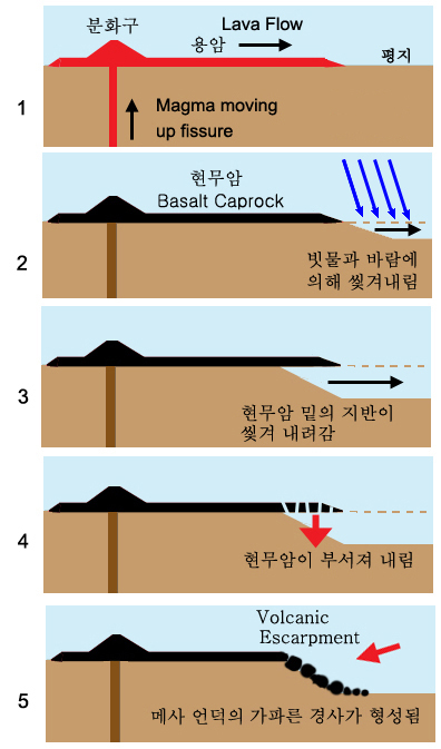 메사의 형성 과정